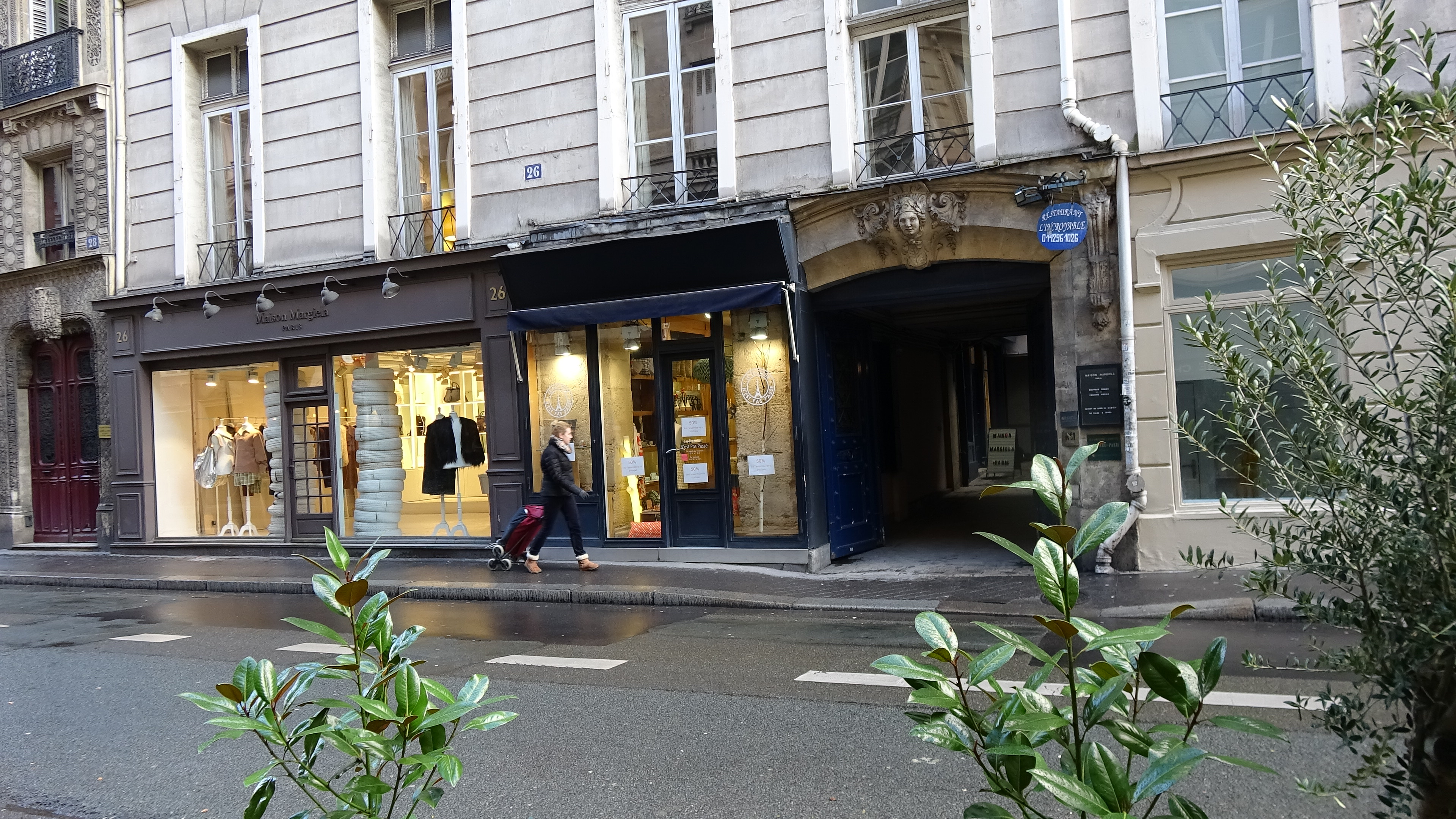 26 rue de Richelieu, ouverture vers le Passage Potier